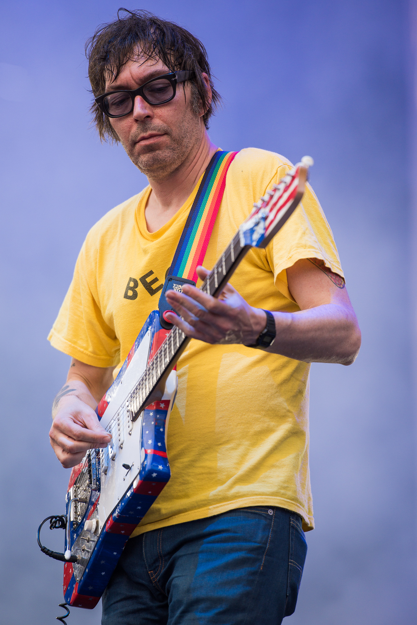 ARGO-Konzerte,Beck's Park Stage,Festival,Konzert,Livekonzert,Livemusik,Musik,RiP,Rick McPhail,Rock im Park 2015,Tocotronic